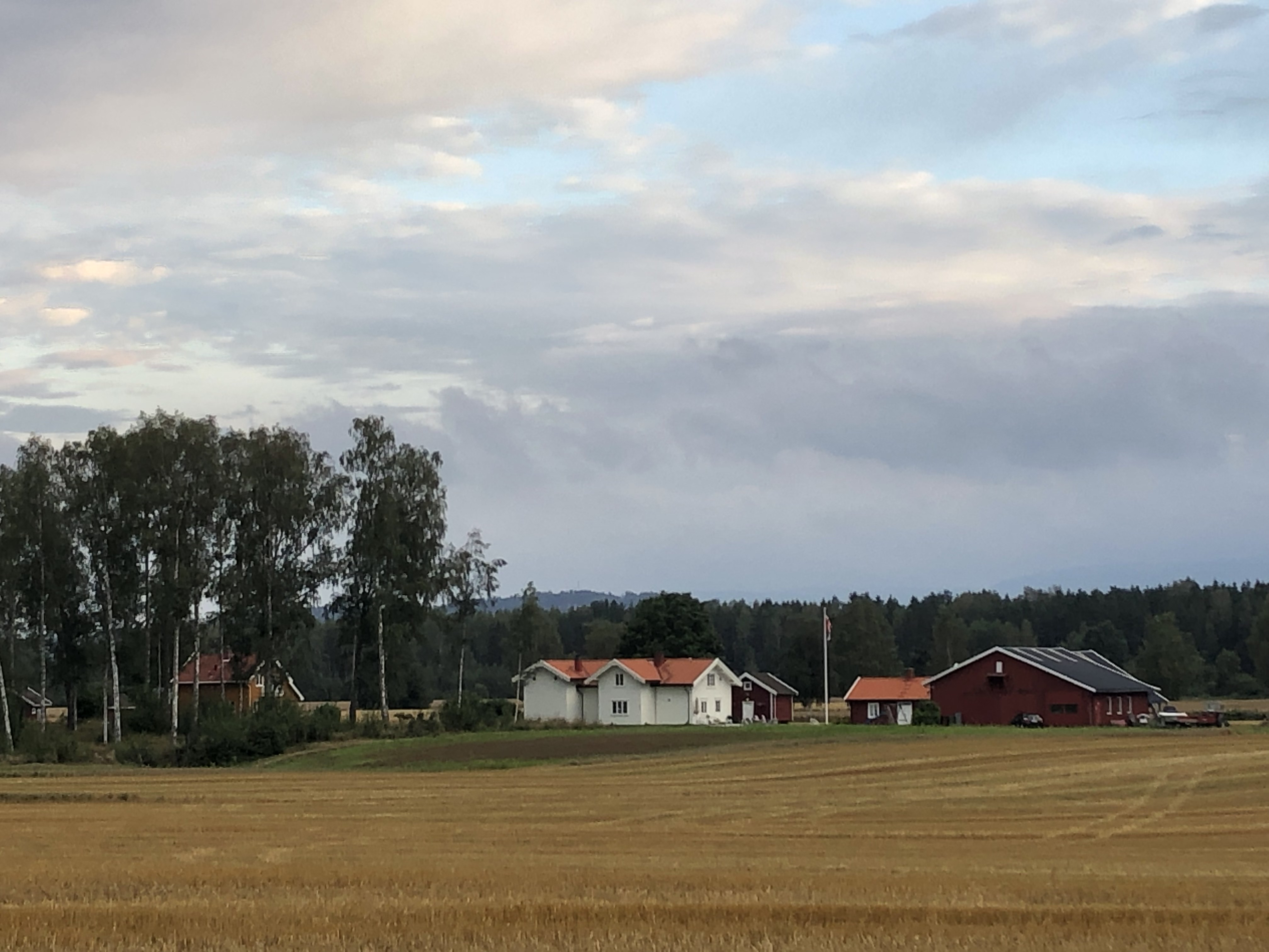 Kapellveien, Ask, Ringerike